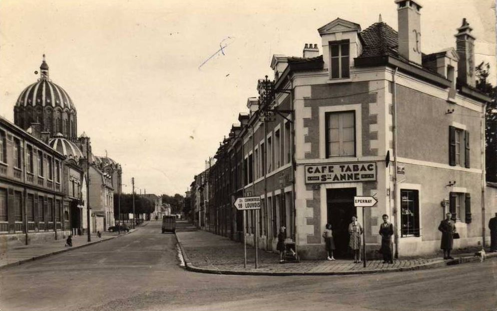 Reims quartier Ste Anne